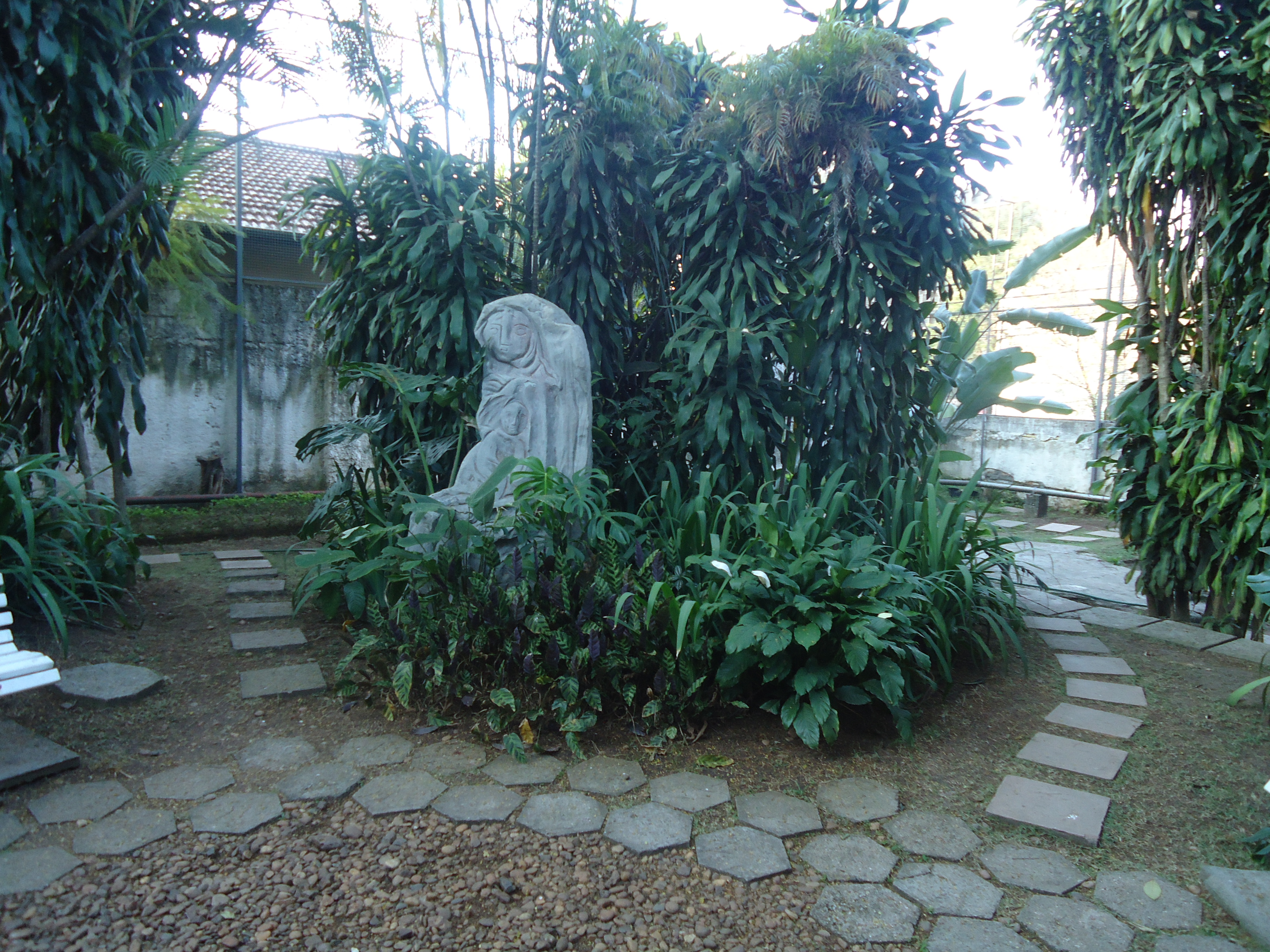 jardim do Museu Lasar Segal